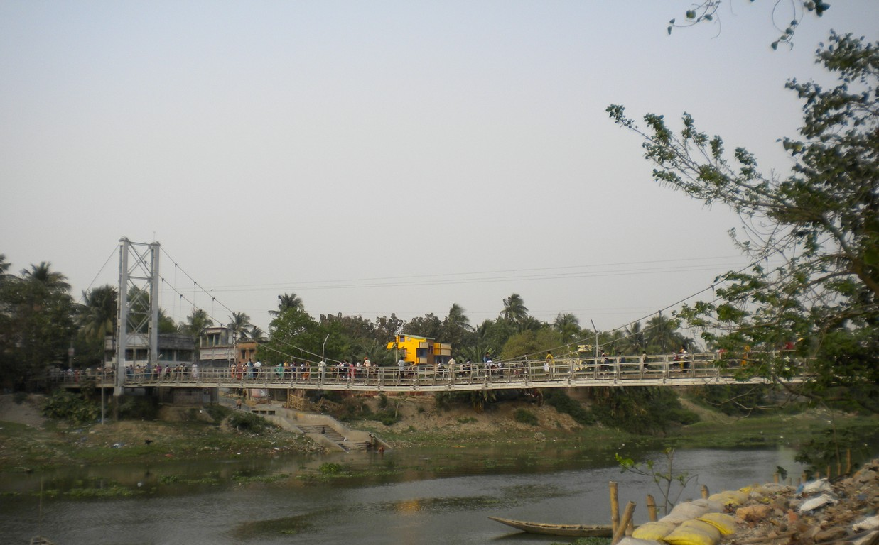 CHURNI RIVER BRIDGE RANAGHAT, West Bengal, India.